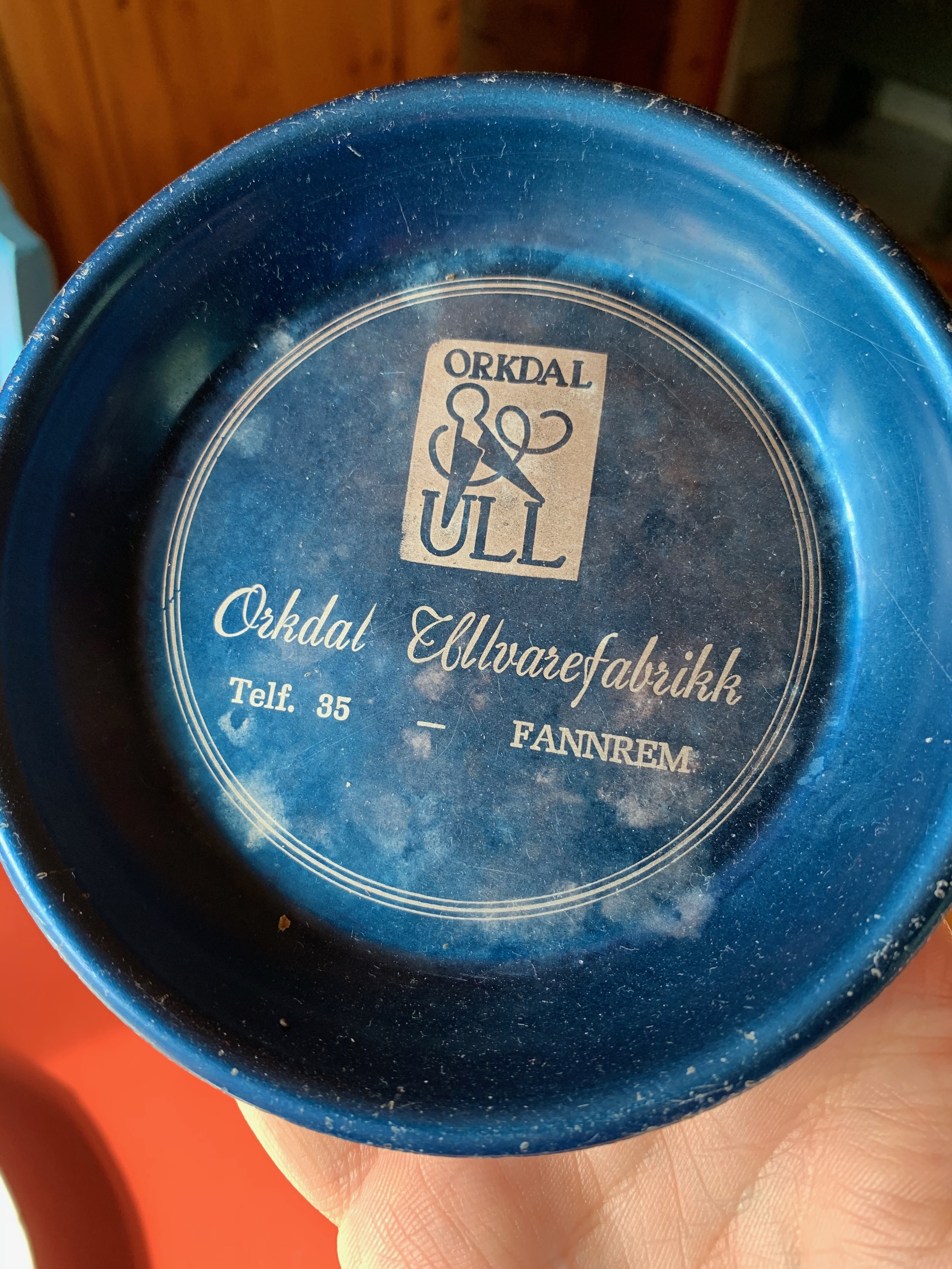 Askebeger fra Orkdal Ullvarefabrikk på Fannrem, ca. 1950.